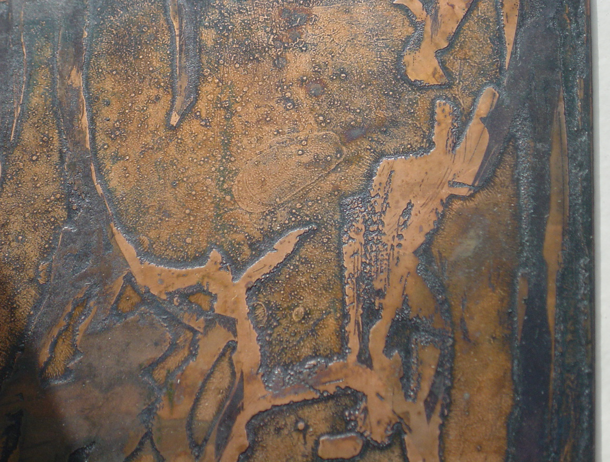 Intaglio printmaking - Etching - Faux-bite